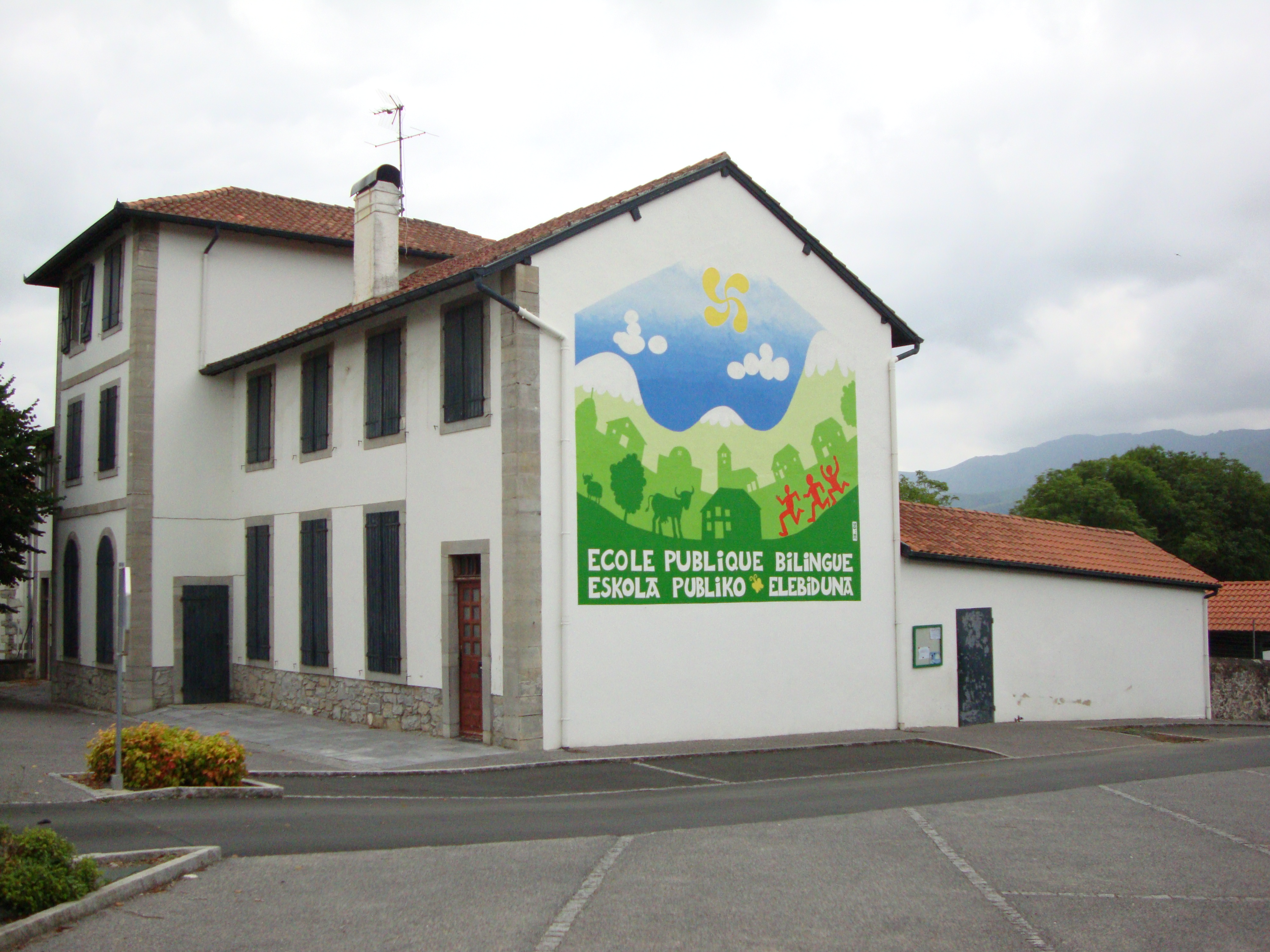 Irissarry (Pyr-Atl, Fr) École publique bilingue.